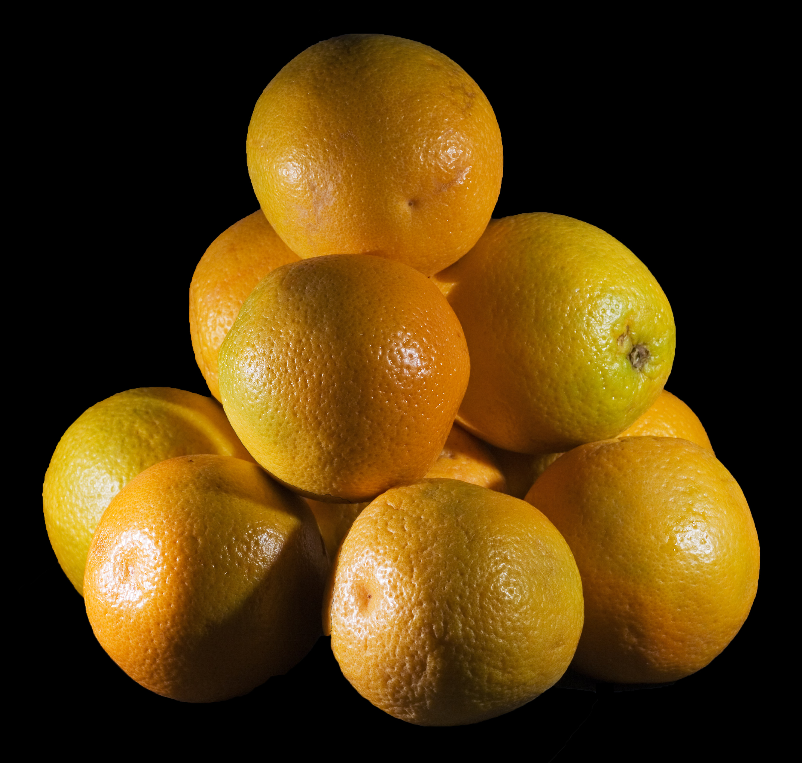 1.2 only